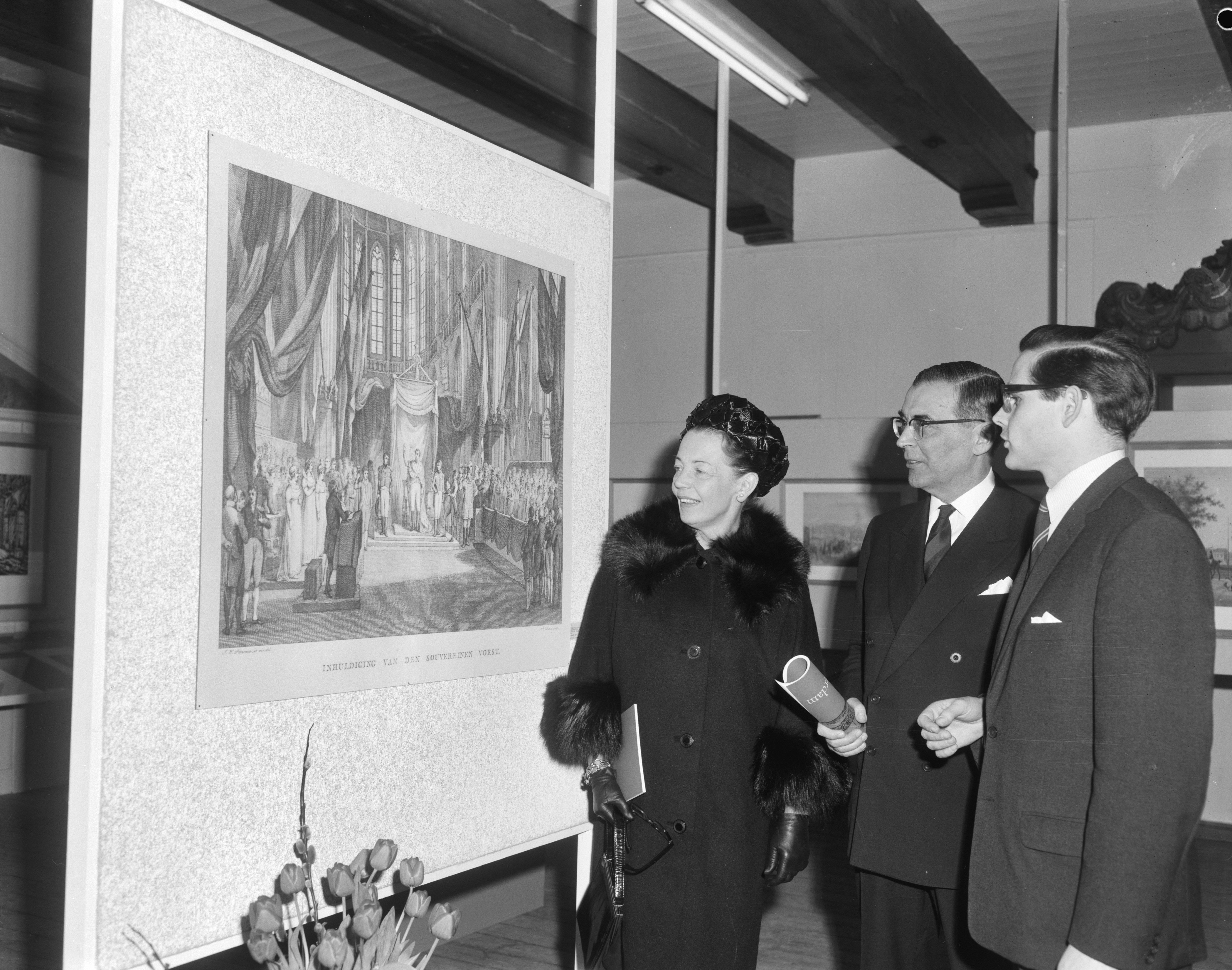 Collectie / Archief : Fotocollectie Anefo Reportage / Serie : [ onbekend ] Beschrijving : 2x Amsterdam mevrouw Van Hall , burgemeester Van Hall jhr. C. C. G. Quarles van Ufford , burgemeester Van Hall en echtgenote Datum : 25 maart 1964 Locatie : Amsterdam, Noord-Holland Trefwoorden : ECHTGENOTES, burgemeesters Fotograaf : Bilsen, Joop van / Anefo Auteursrechthebbende : Nationaal Archief Materiaalsoort : Negatief (zwart/wit) Nummer archiefinventaris : bekijk toegang 2.24.01.04 Bestanddeelnummer : 916-2280 Reacties Geplaatst door Geertje op 02 september 2014 - 19:01. Tentoonstelling 2x Amsterdam in het Waaggebouw waarin gevestigd het Amsterdams historisch museum NB. Het betreft hier een tentoonstelling bestaande uit 125 topografische prenten, tekeningen en etsen die een vergelijkend beeld geven van het Amsterdam van 1813 en 1963 Trefwoorden: tentoonstellingen Persoonsnamen: Hall, van, G., Hall-Nijhof, van, E.